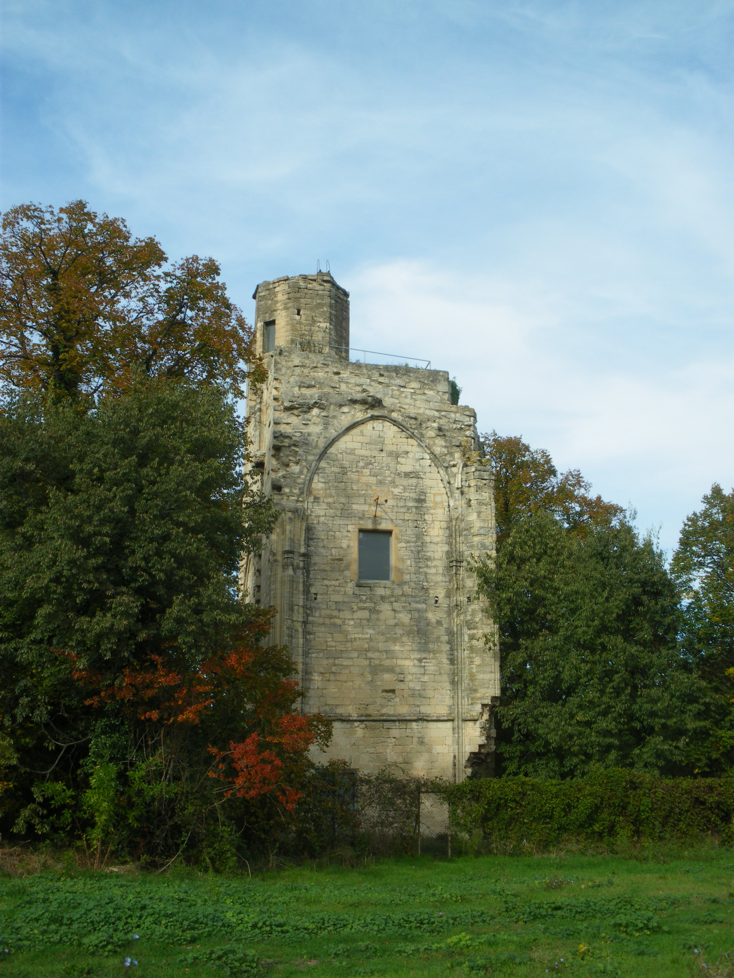 Tour médiéval à Montfavet, vignon, Vaucluse, France